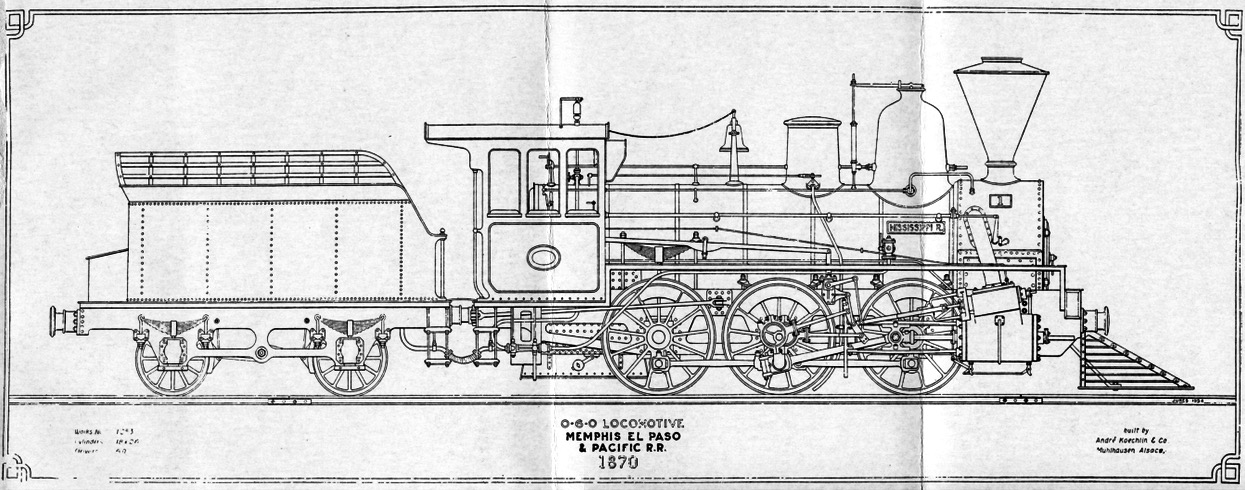 Dibujo de la locomotora Mississippi River construida por André Koechlin & Cie para el ferrocarril estadounidense Memphis, El Paso & Pacific